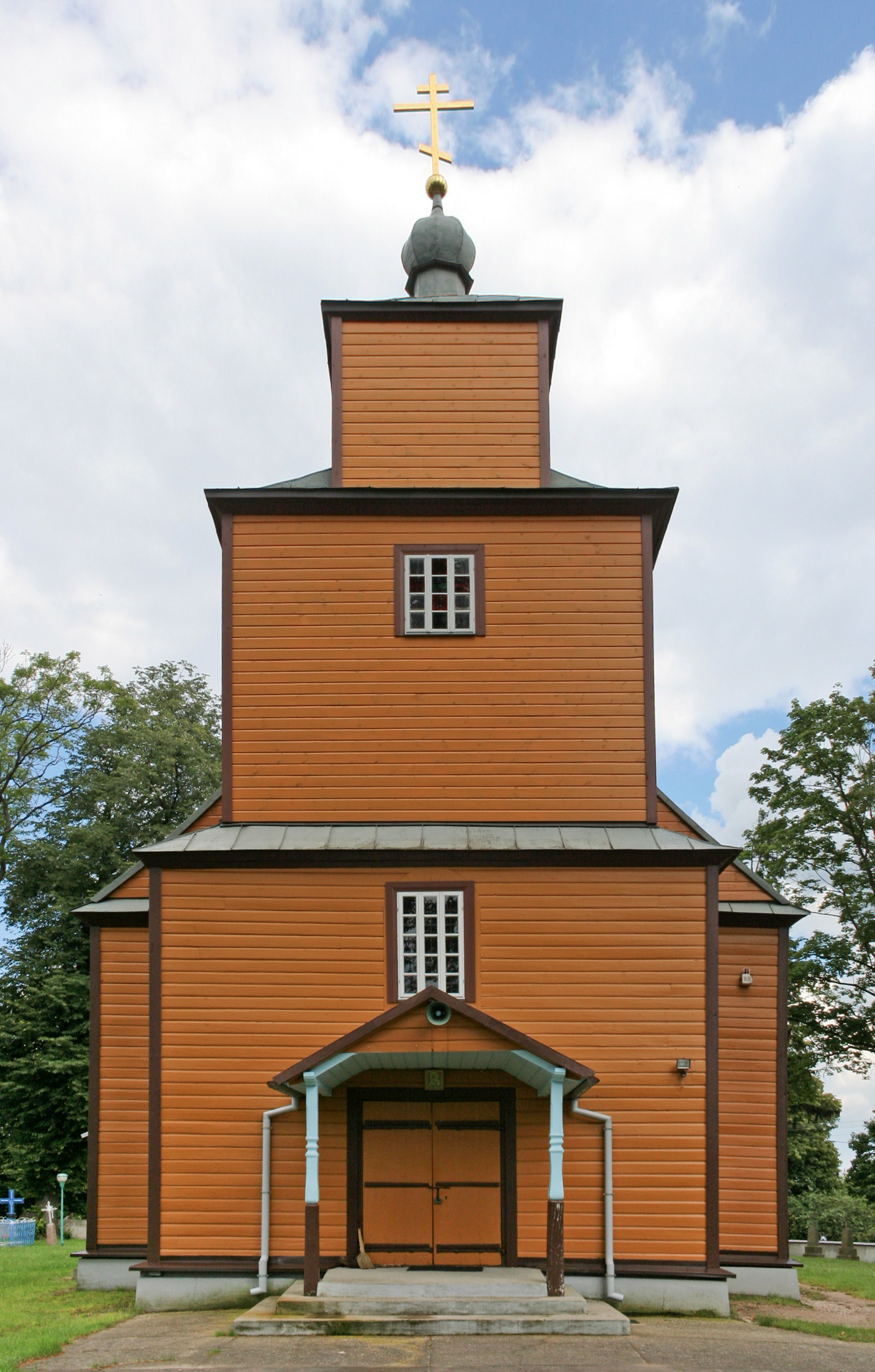 Cerkiew Narodzenia NMP w Rogaczach.